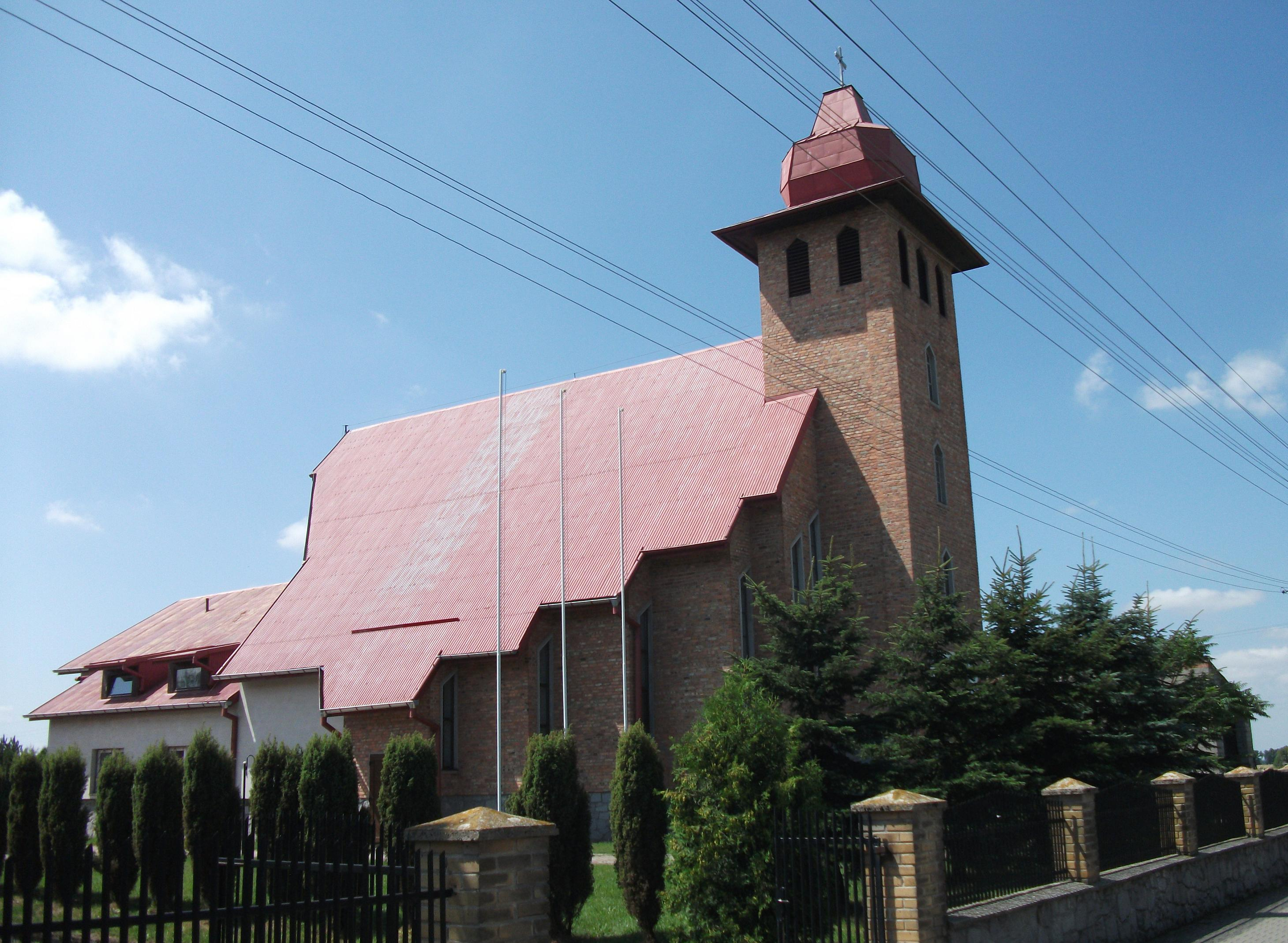 Kościół w Kurowie k/Wielunia